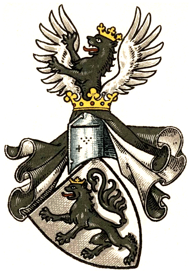 Wappen der Edelherren von Büren